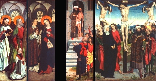 Triptyque avec crucifixion au complet